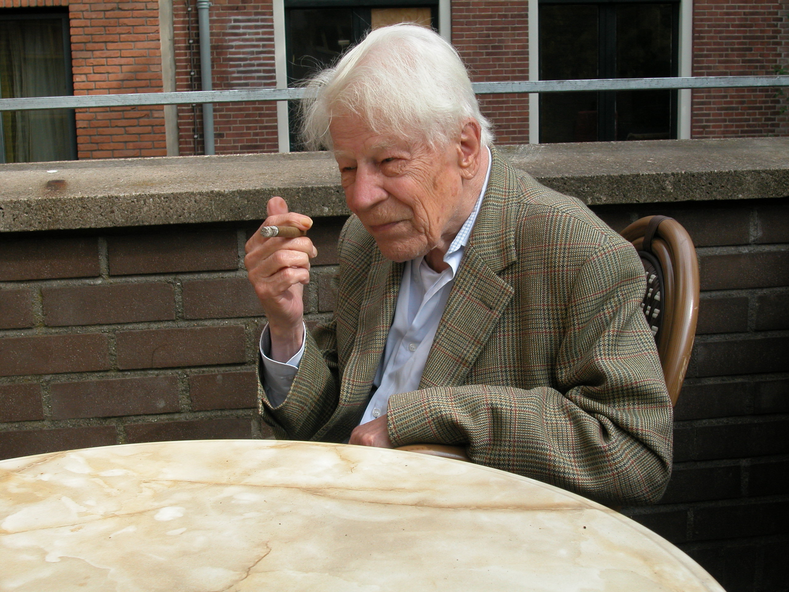 Drs. P. gefotografeerd bij een bezoek aan hem, toen hij woonde in bejaardenhuis "De Flesseman"